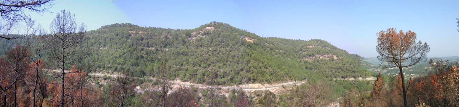 Les Costes i el Serrat de Mussarra des de llevant